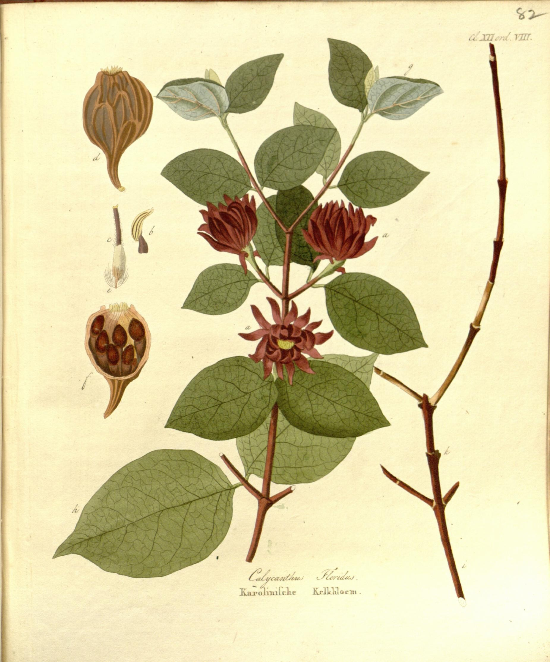 ^ -^ . . -^ 'Jr.?*Li;-a Ptnftr .!■, iIi^^k-F^TSM-"*!*^' i/j3Jiyy r^W. kkMd^ fr I I « a.M^i f i^^' c /a:'?yd4U . •oliiiilrlte KpIVIvI o em ■■i.